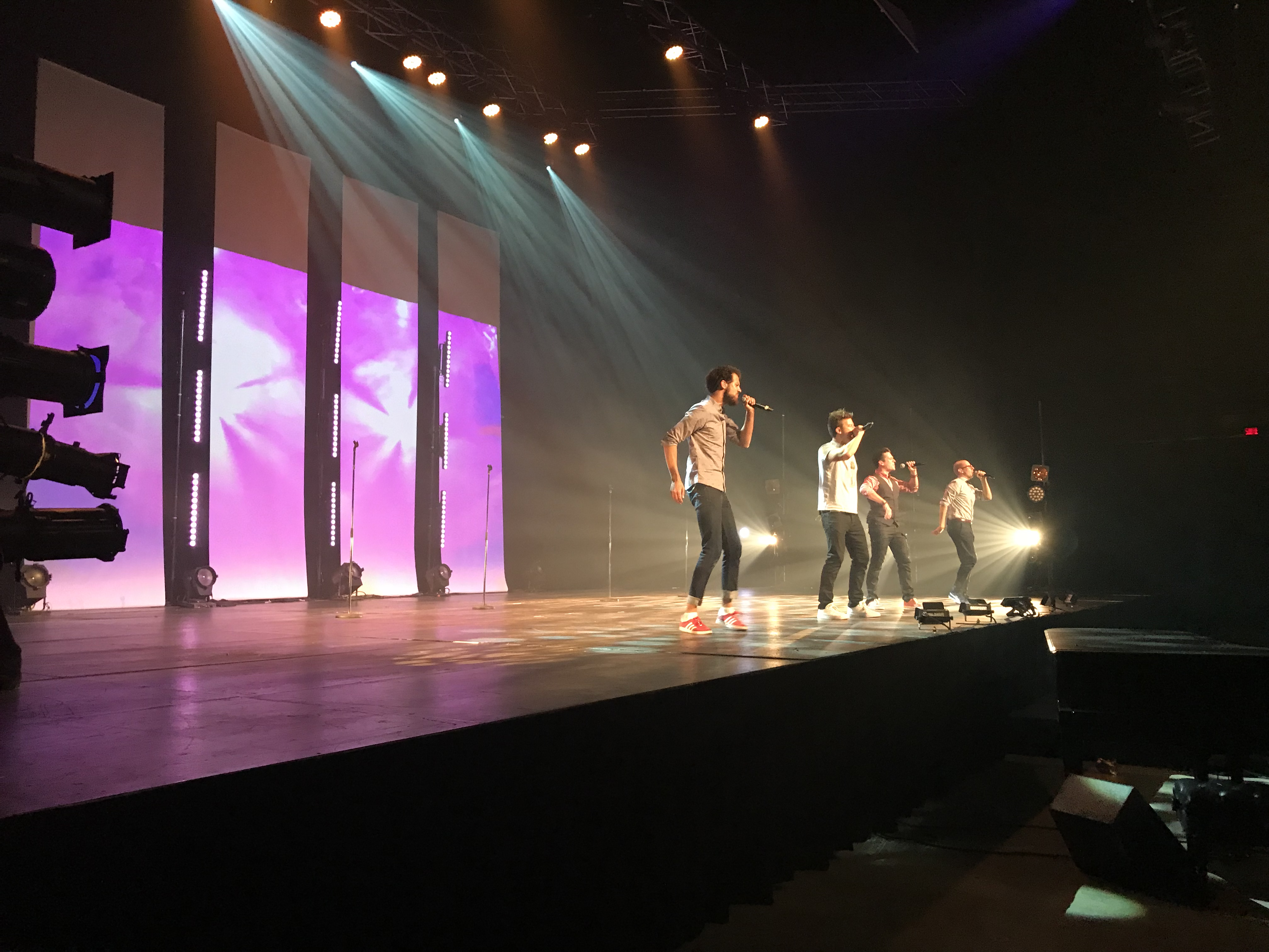 Première du spectacle Le meilleur des quatre au Théâtre Maisonneuve de la Place des Arts (2017).